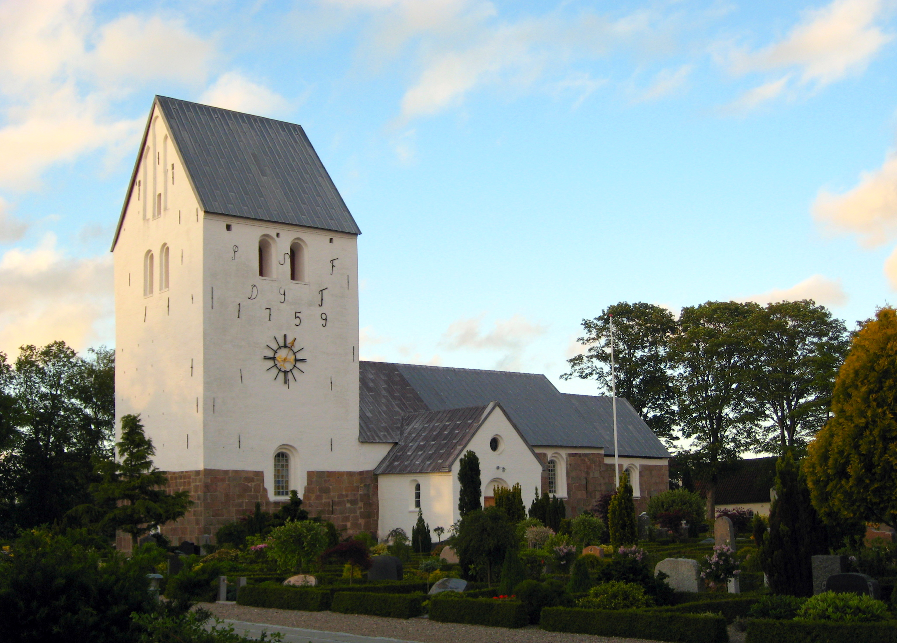 Hellevad Kirke, Brønderslev Kommune